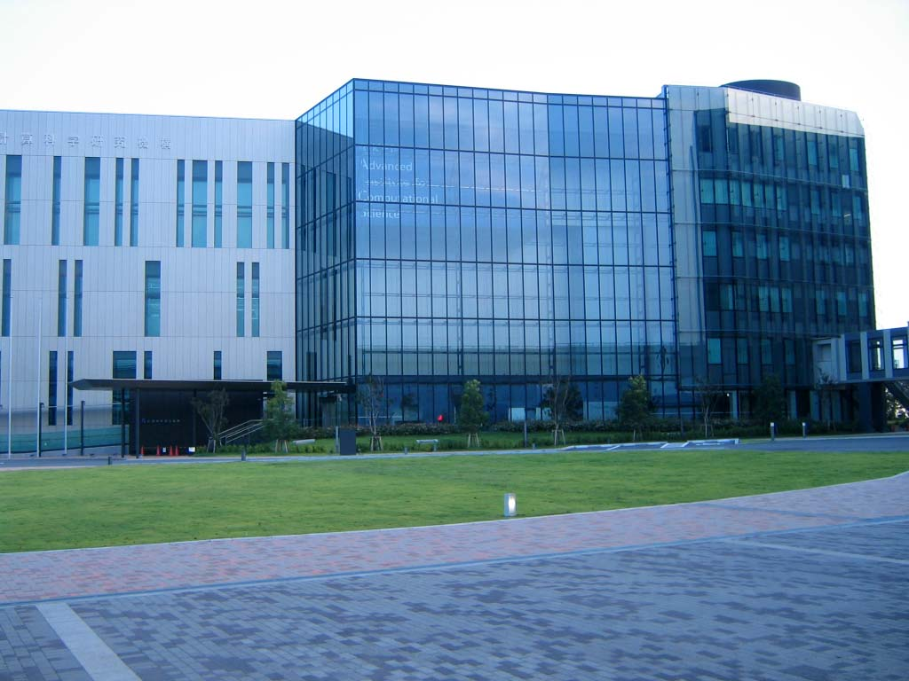 理化学研究所計算科学研究機構(RIKEN AICS)。兵庫県神戸市中央区港島南町7-1-26